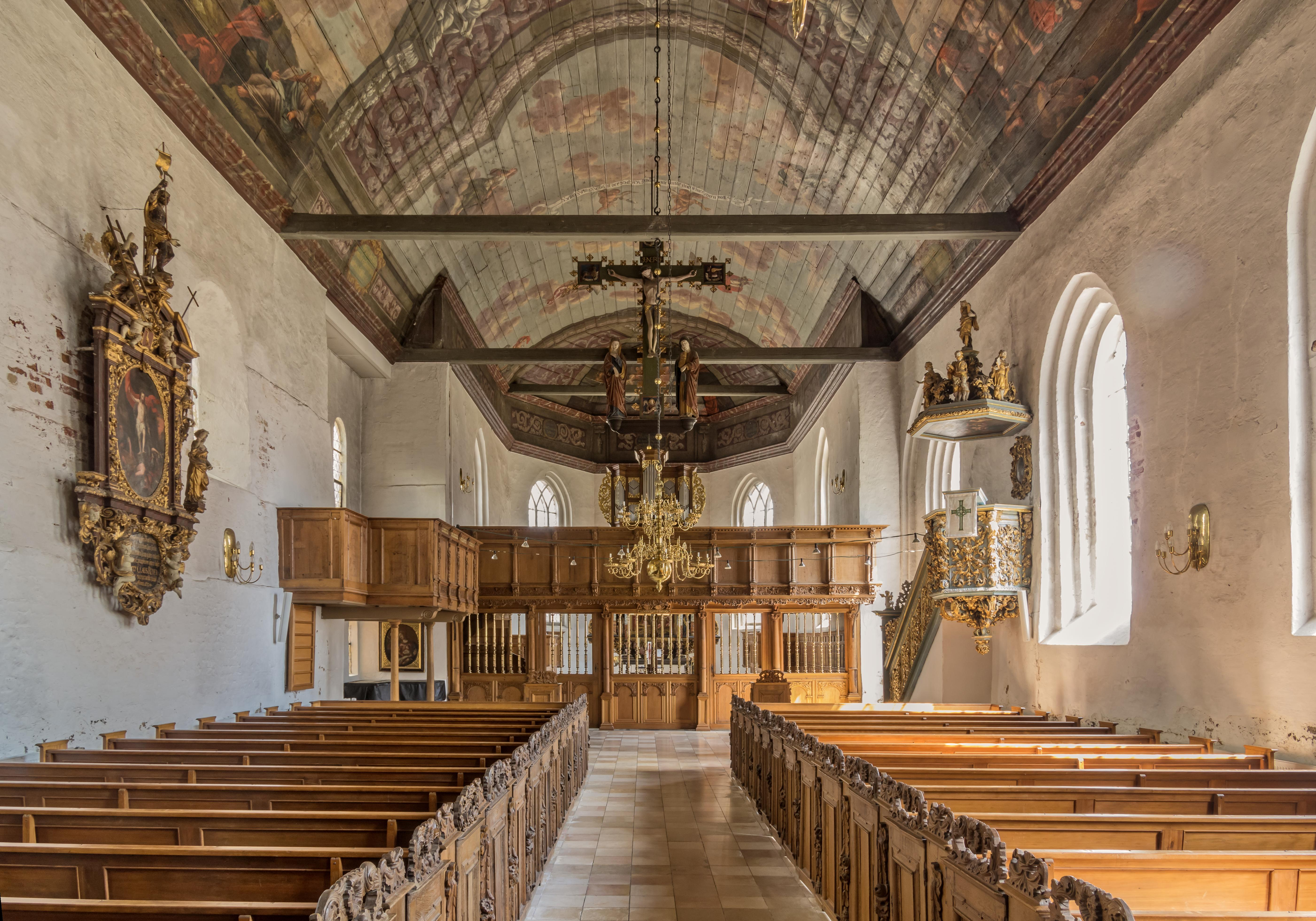 Bilder aus Tönning Die St. Laurentius Kirche in Tönning, Bilder von innen und außen